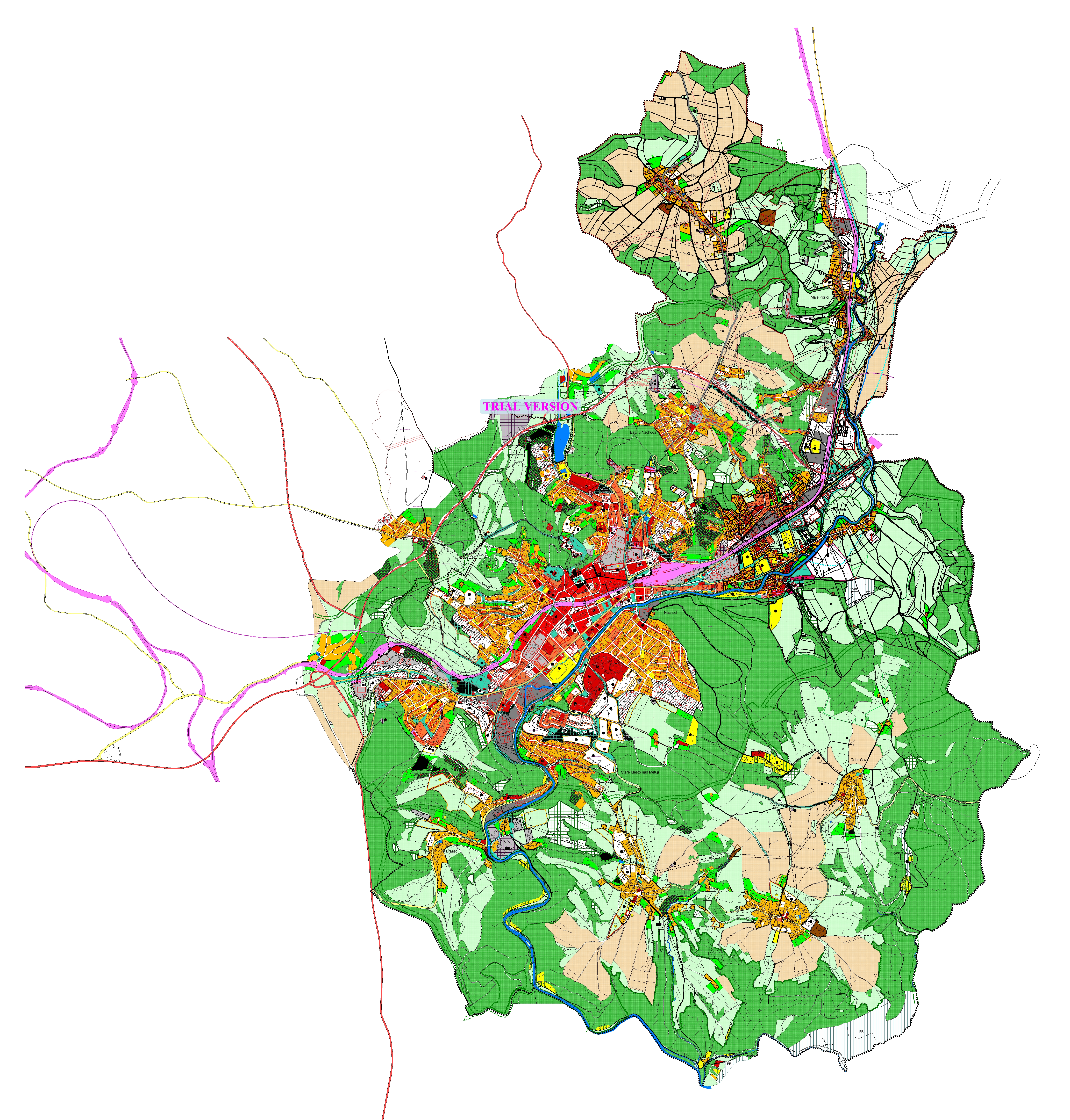 Územní plán - Náchod - včetně změny č. 3 z ledna 2007: Územní plán sídelního útvaru Náchod: zahrnuje tato katastrální území: Náchod, Staré Město nad Metují, Bražec, Běloves, Babí u Náchoda, Pavlišov, Malé Poříčí, Lipí u Náchoda, Jizbice u Náchoda, Dobrošov. Územní plán sídelního útvaru Náchod byl schválen dne 7.9.1998 usnesením zastupitelstva města č. III. a) - Vyhláška č. 7 o závazných částech územního plánu sídelního útvaru Náchod Změny ÚPSÚ Náchod byly projednány a schváleny: Změna č. 1 ÚPSÚ Náchod schválena zastupitelstvem města dne 11.10.2004 usnesením č. III. b) - Obecně závazná vyhláška č. 4/2004 Změna č. 2 ÚPSÚ Náchod schválena zastupitelstvem města dne 24.9.2007 usnesením č. V. b) - Opatření obecné povahy č. 2/2007 Změna č. 3 ÚPSÚ Náchod schválena zastupitelstvem města dne 24.9.2007 usnesením č. V. a) - Opatření obecné povahy č. 1/2007